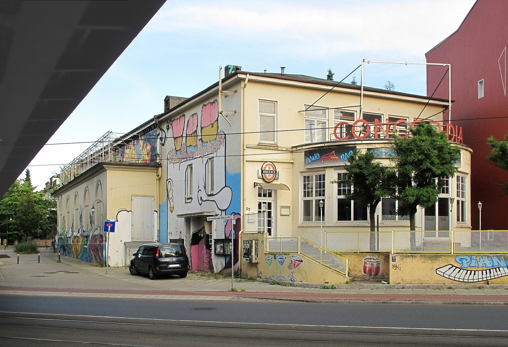 Concordia-Theater, Bremen (Theaterhaus, Schwachhauser Heerstraße 17) im August 2014; Blick aus dem Concordiatunnel, links oben die Bahnbrücke